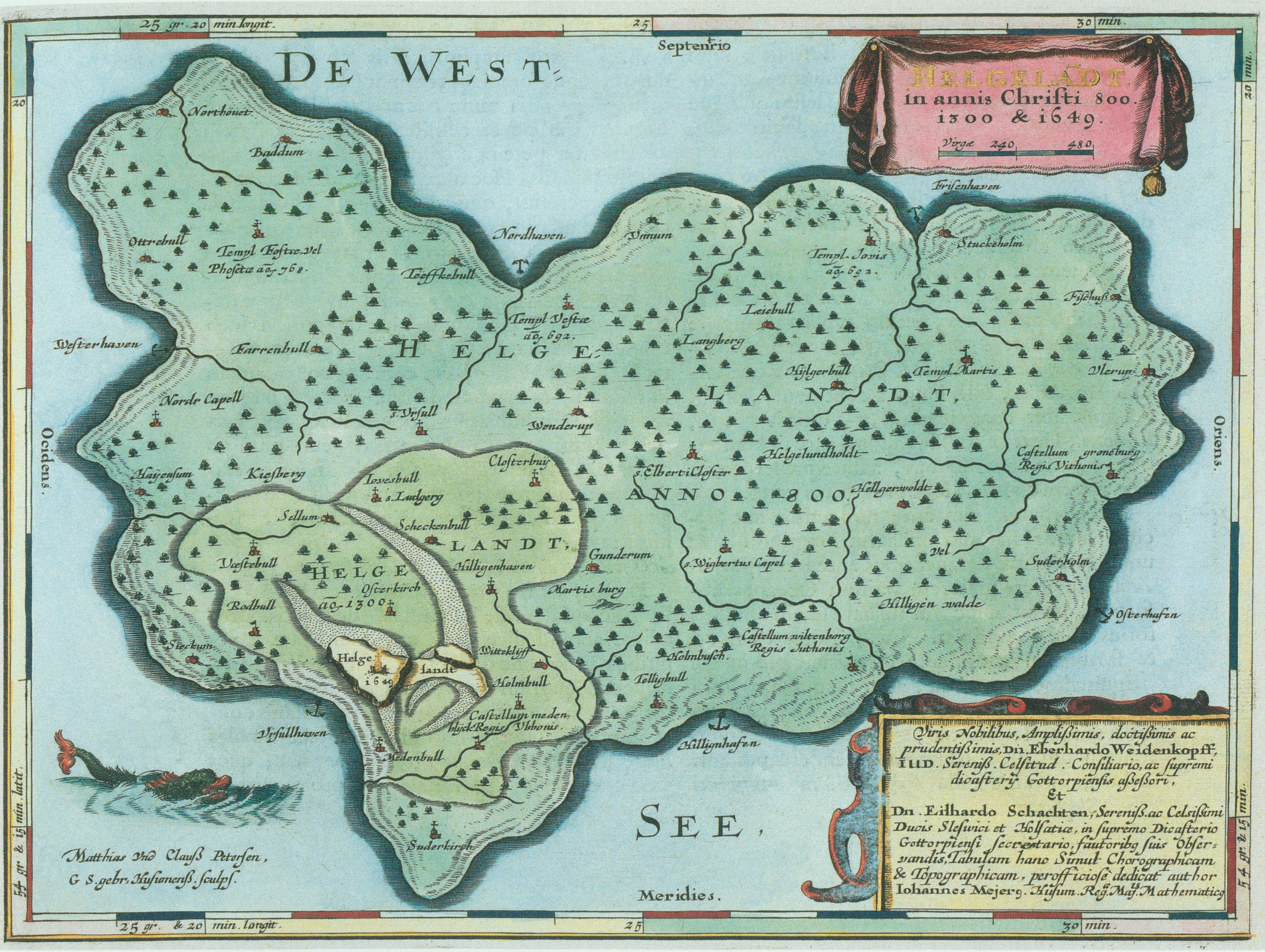 Helgoand in den Jahren 1500 & 1649